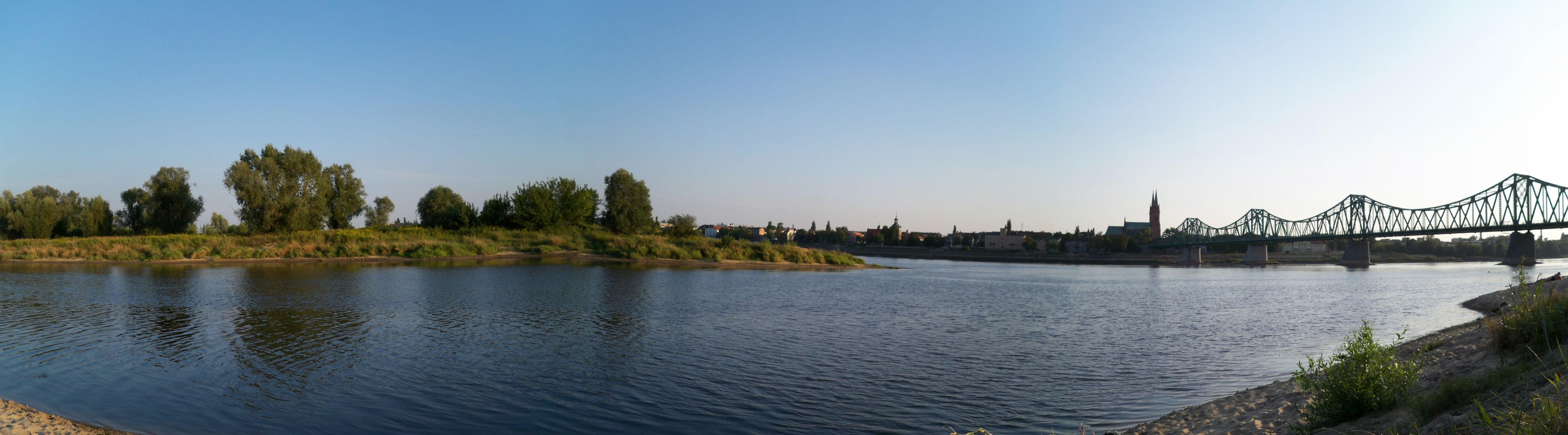 Wisła we Włocławku (2009 r.)